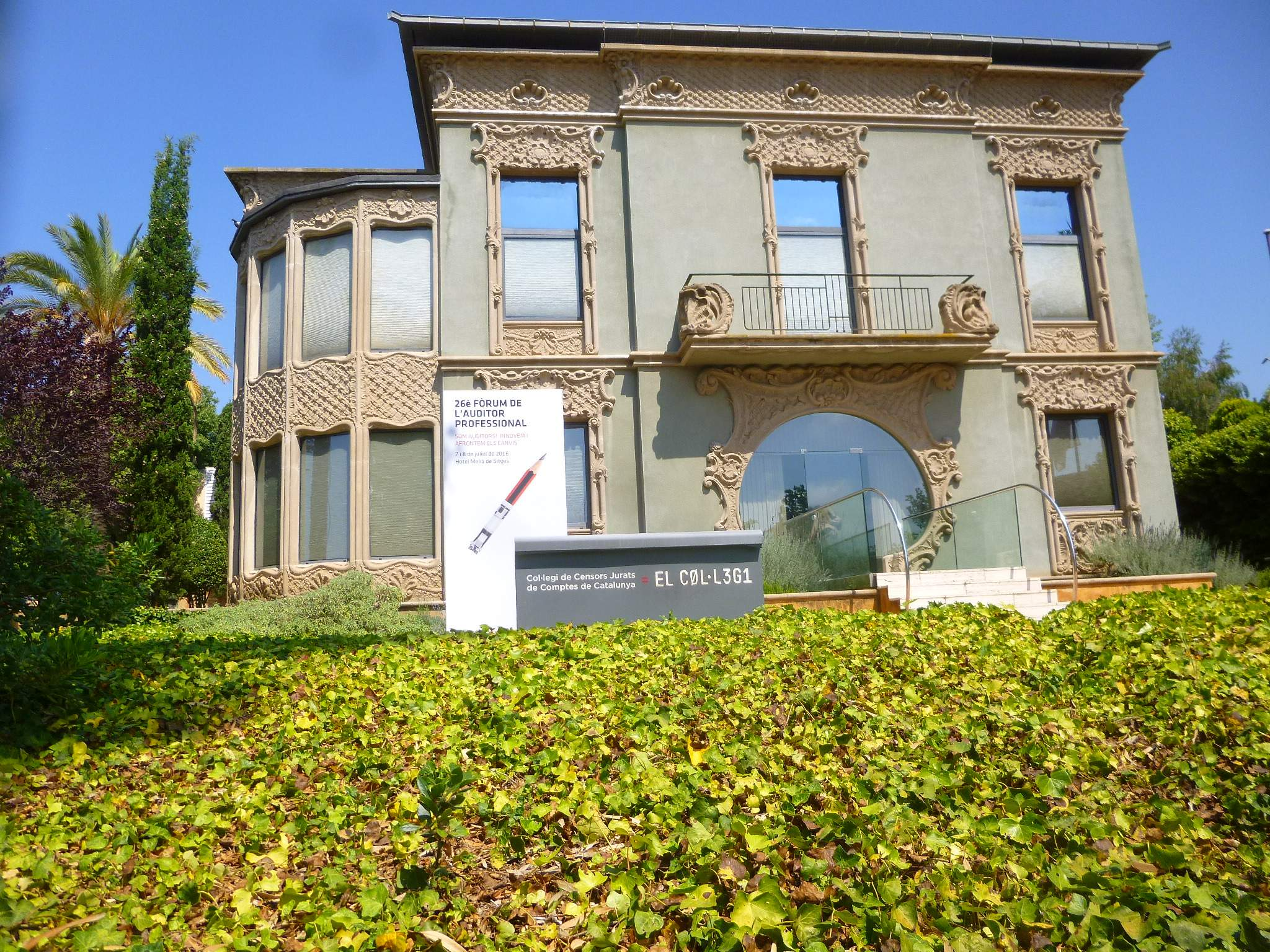 Barcelona - Col·legi de Censors Jurats de Comptes de Catalunya